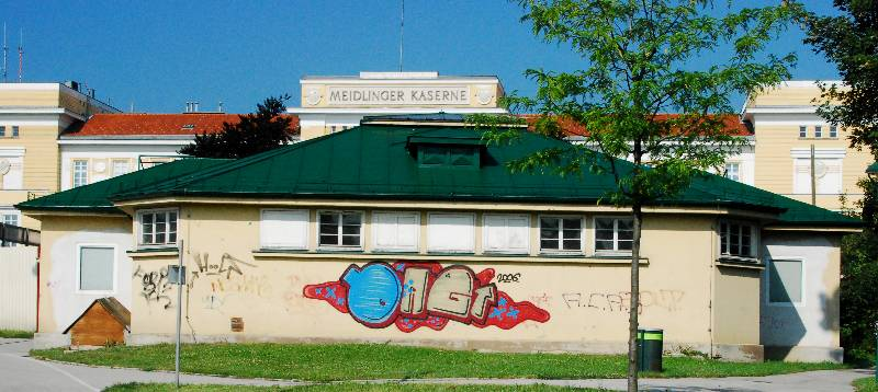 Ehemaliges Kinderfreibad Ruckergasse in Wien-Meidling. Heute ein Stützpunkt des Stadtgartenamts